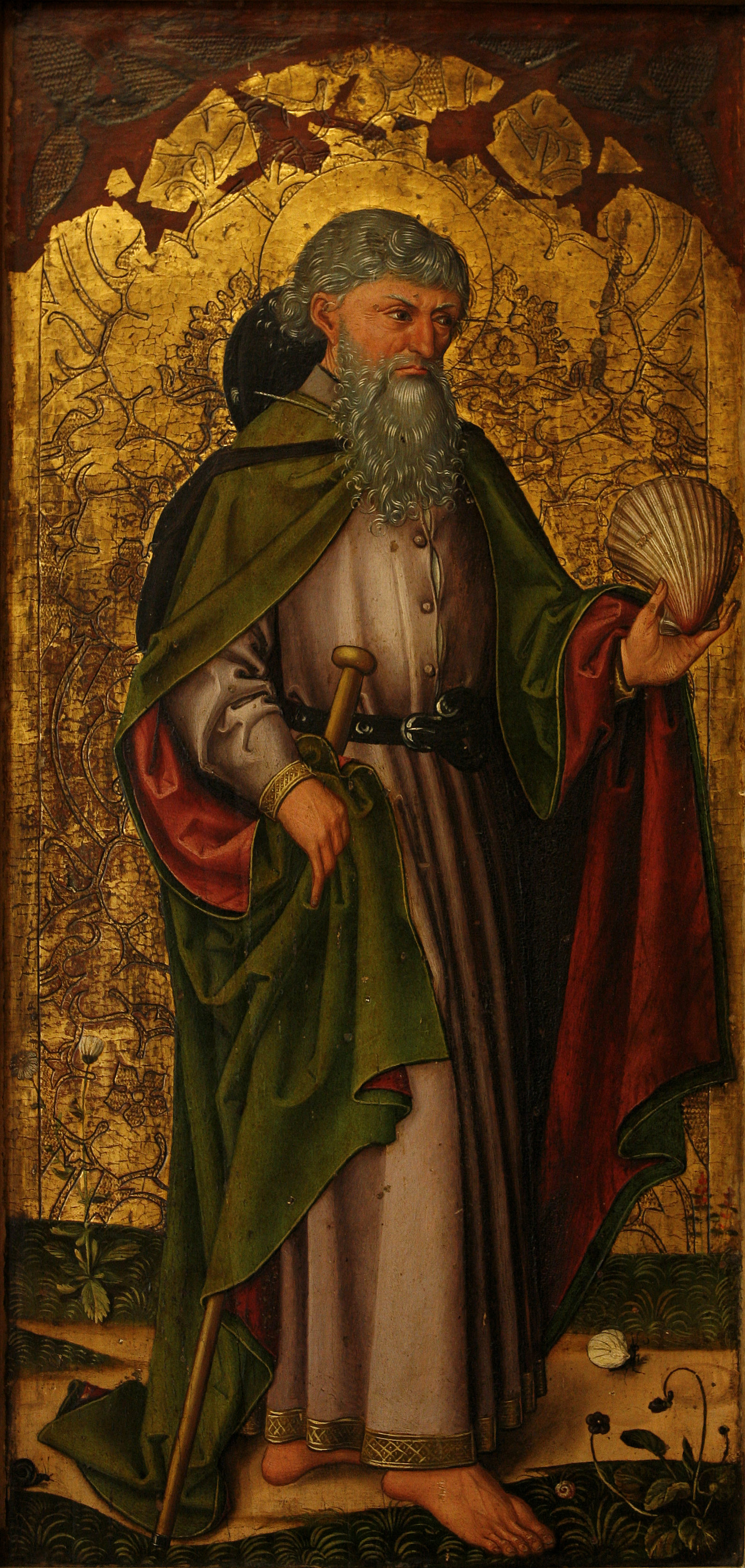 Saint James.